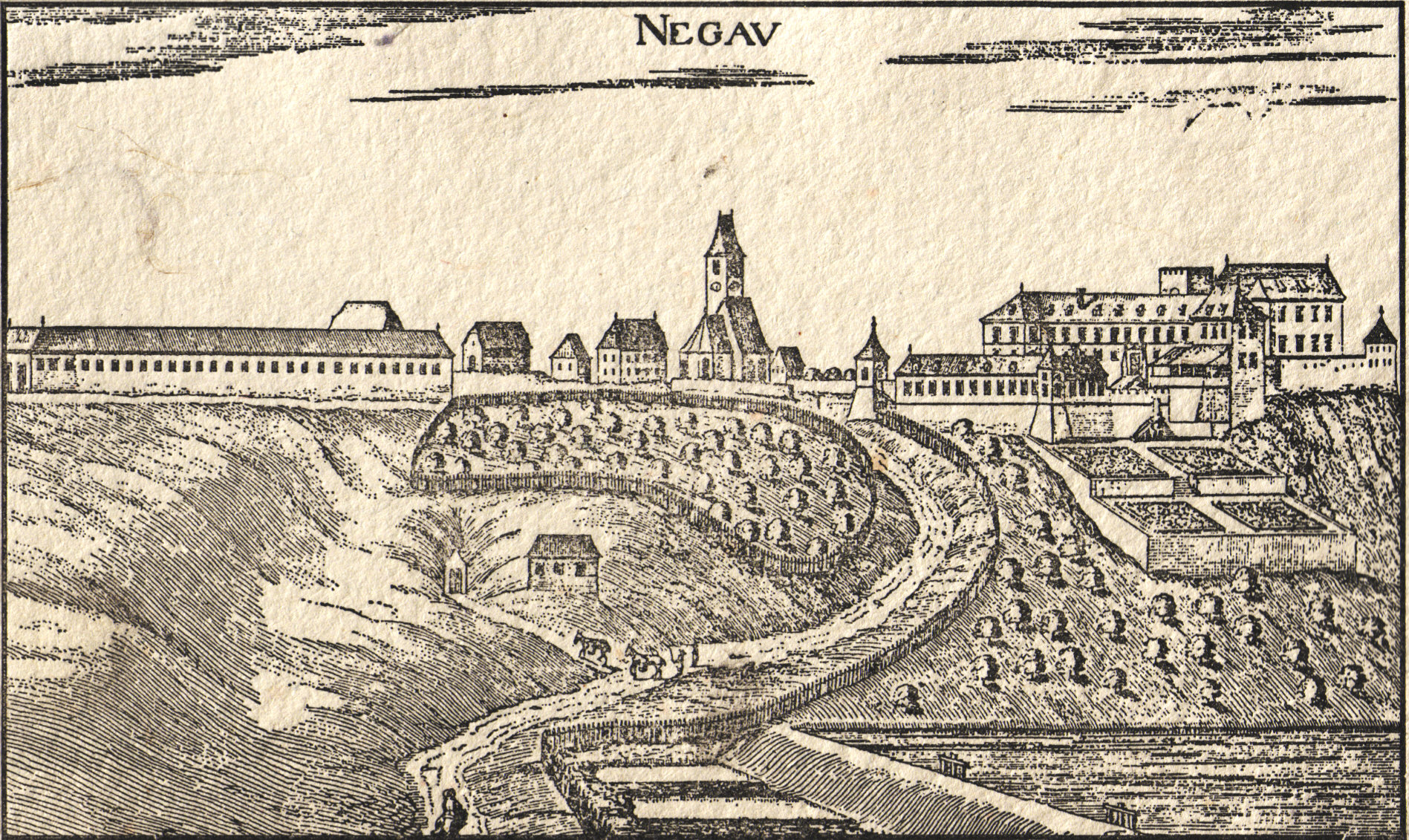 Slika prikazuje Negovo nekoč.